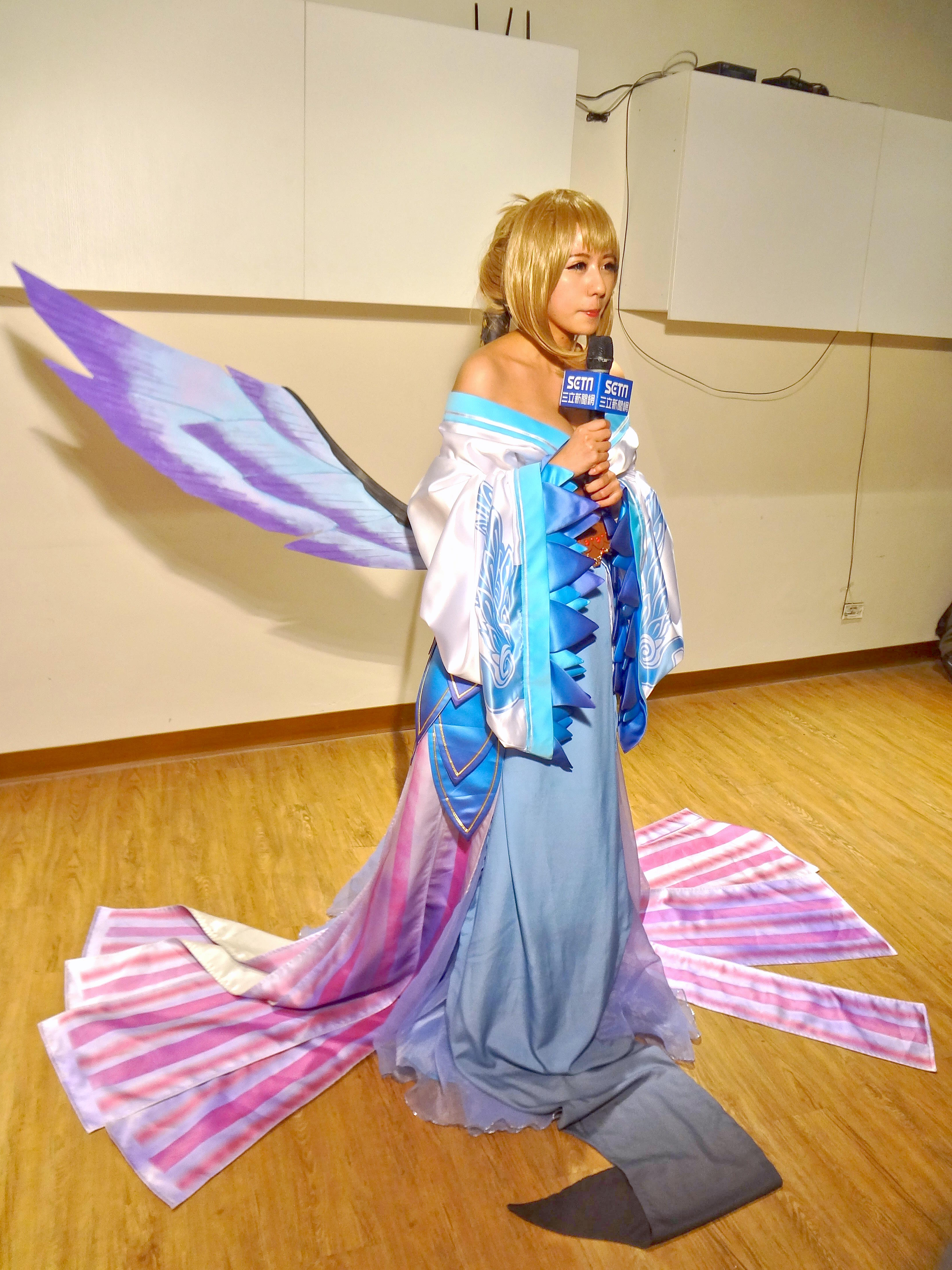 第2屆漫創地平線，潘家儀（咖滋咪）cosplay《仙劍奇俠傳 幻璃鏡》雪凝，為《三立新聞網》錄製新聞影片。